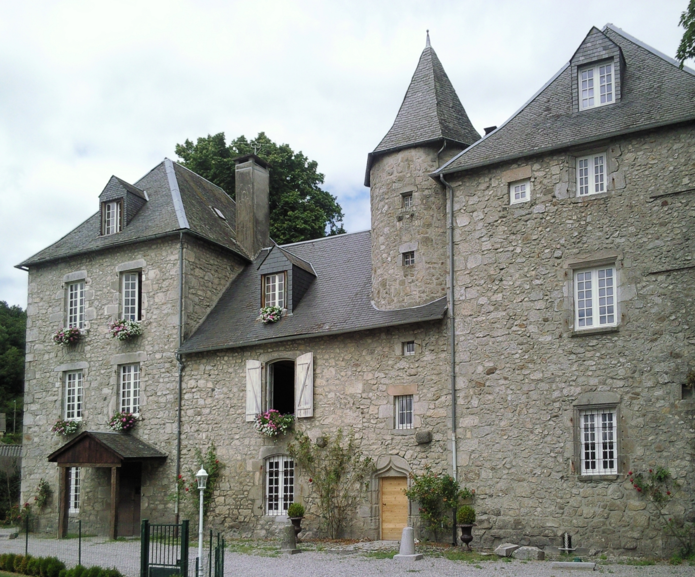 Chateau de la Borde à Ussel (Corrèze)